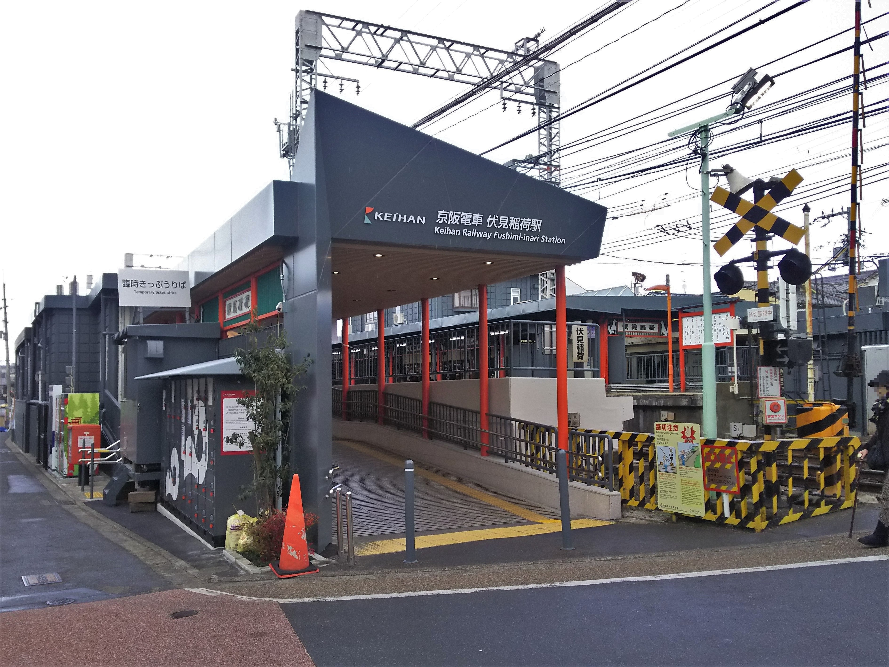 リニューアル後の京阪本線伏見稲荷駅京都方面駅舎（京都市伏見区）